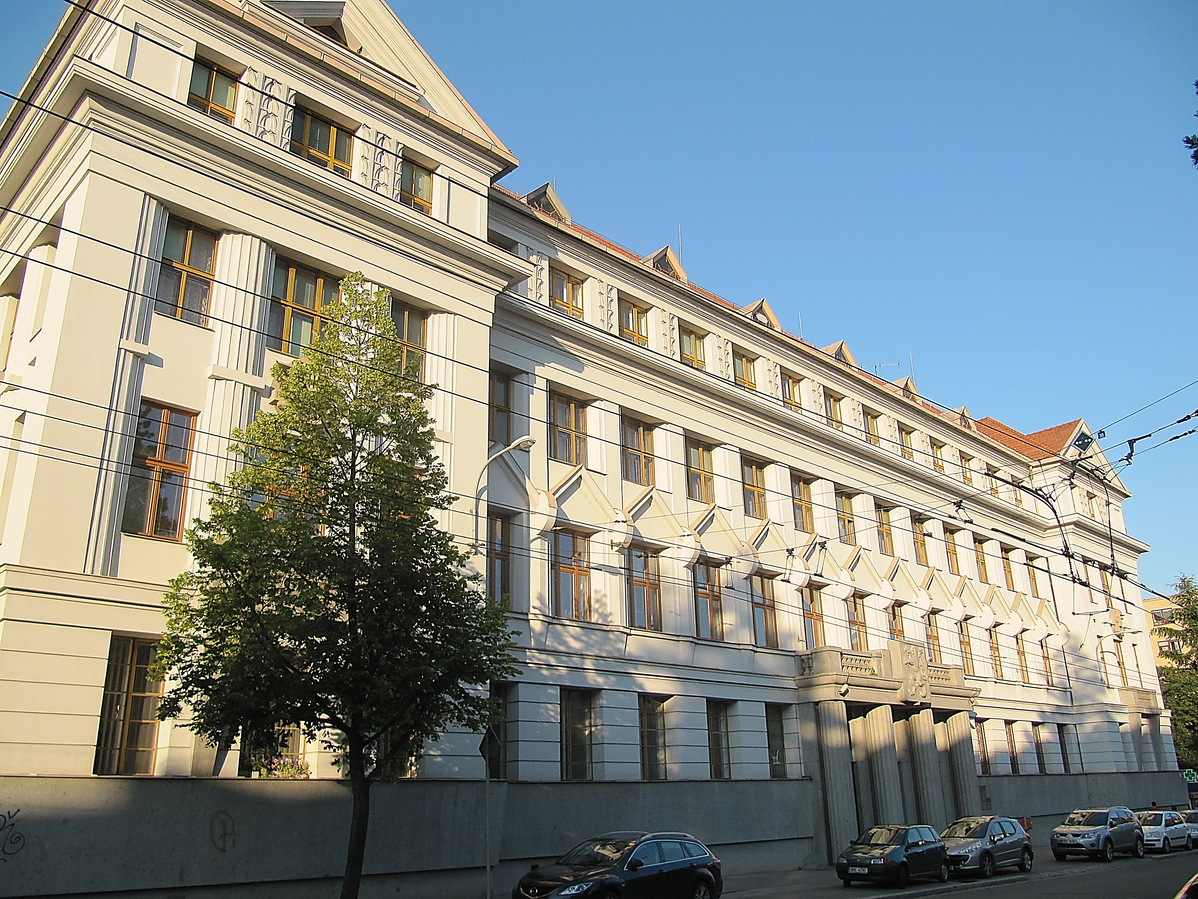 Jiná správní stavba, z toho jen: průčelí (Brno), Brno - Veveří, Kounicova 688/26, Brno